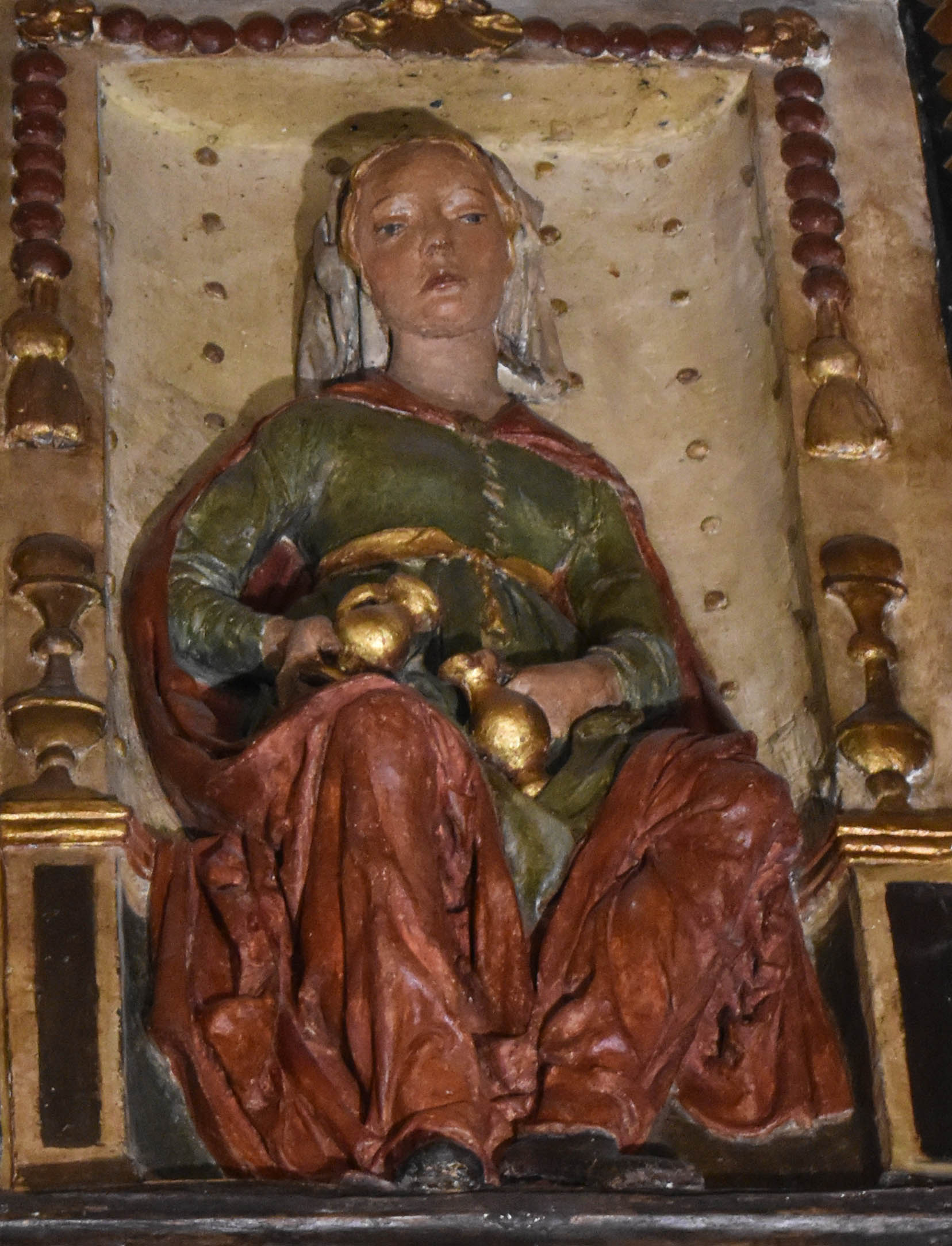 Domenico di Paris, Temperanza, (1467), sala degli Stucchi o delle Virtù, Palazzo Schifanoia